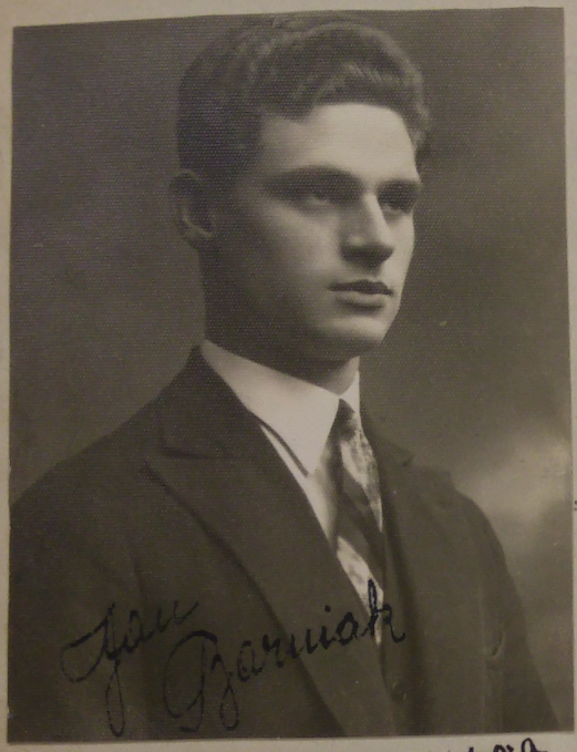 Zdjęcie z dyplomu, st. strz. pchor. Jana Barniak ps. "Wrzos", żołnierza OP-11. 1931.